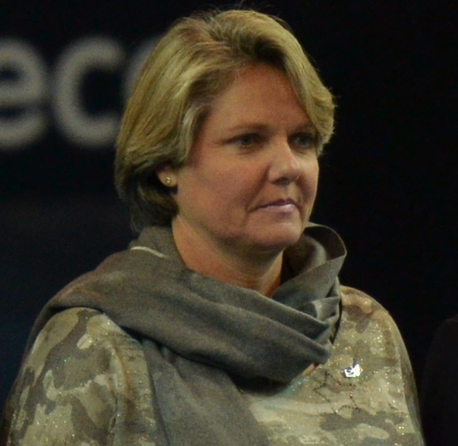 PPP_3181